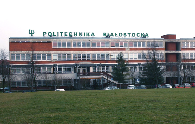 Wydział informatyki Politechniki Białostockiej